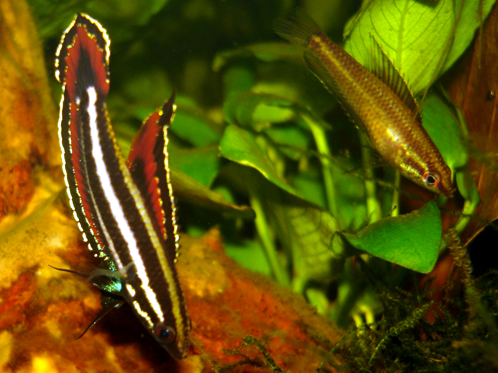 balzendes Prachtguramipaar